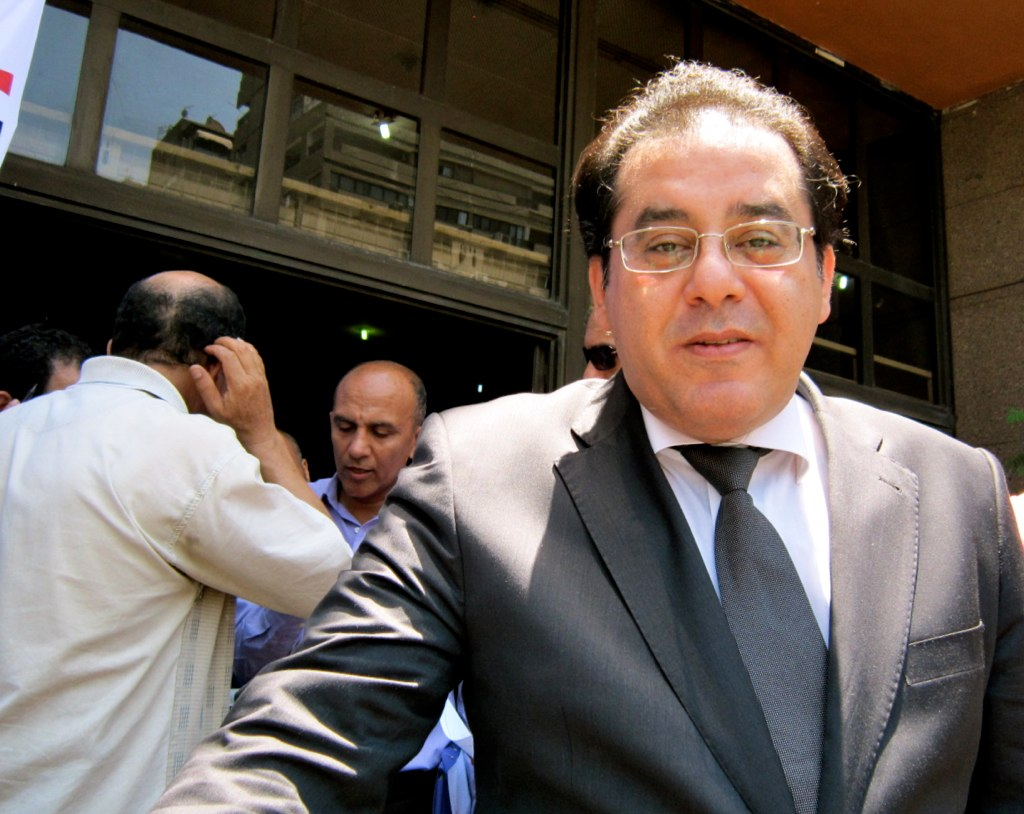 Ayman Noor